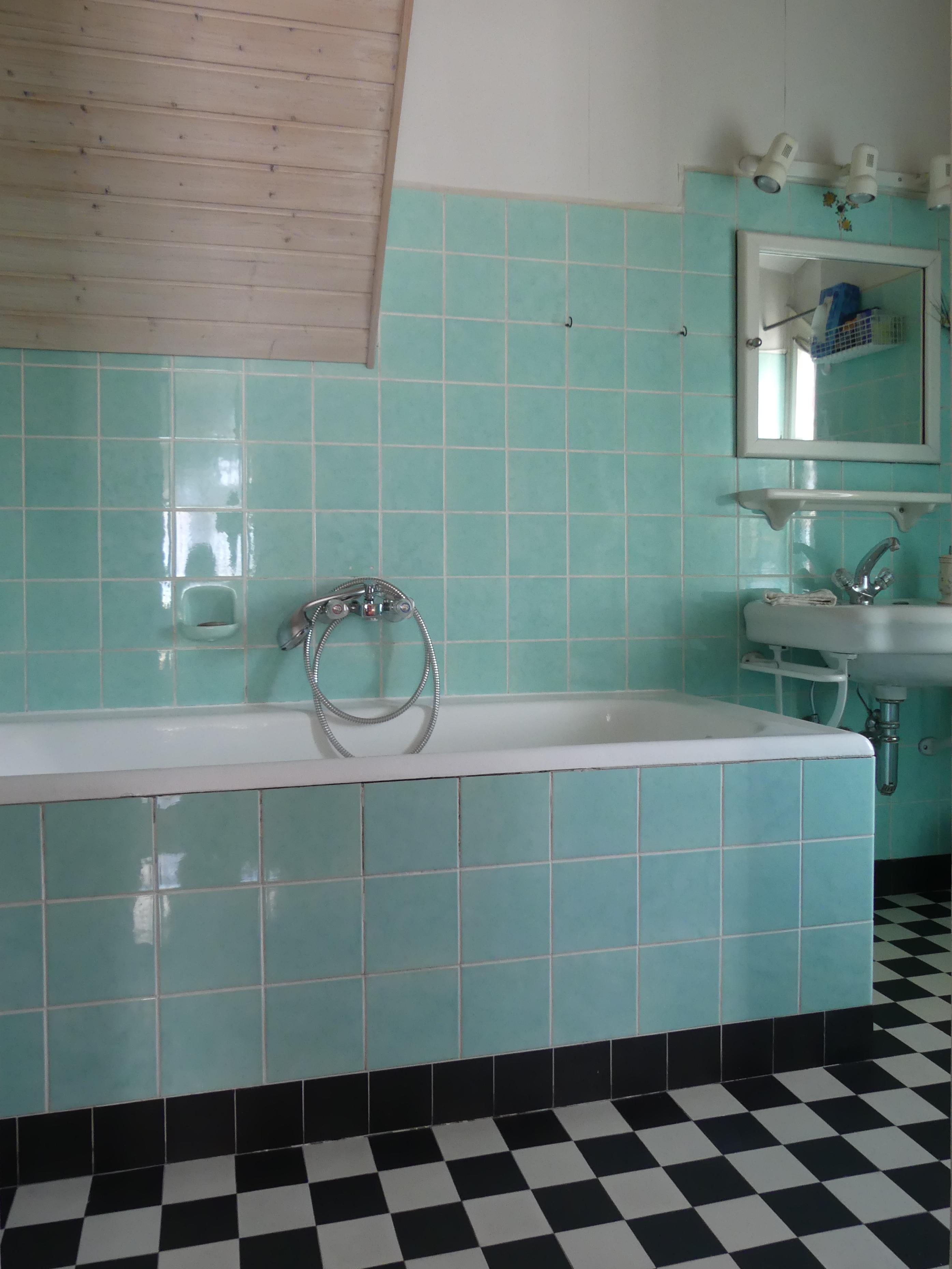 Das Haus Rheinstraße 4 in Lustenau im österreichischen Bundesland Vorarlberg, auch als „Villa Robert Bösch“ bezeichnet, ist ein für die großbürgerliche Bau- und Wohnkultur der Zeit um 1900 charakteristischer Jugendstilbau. Im Badezimmer sind noch die originalen Jugendstilfliesen erhalten.